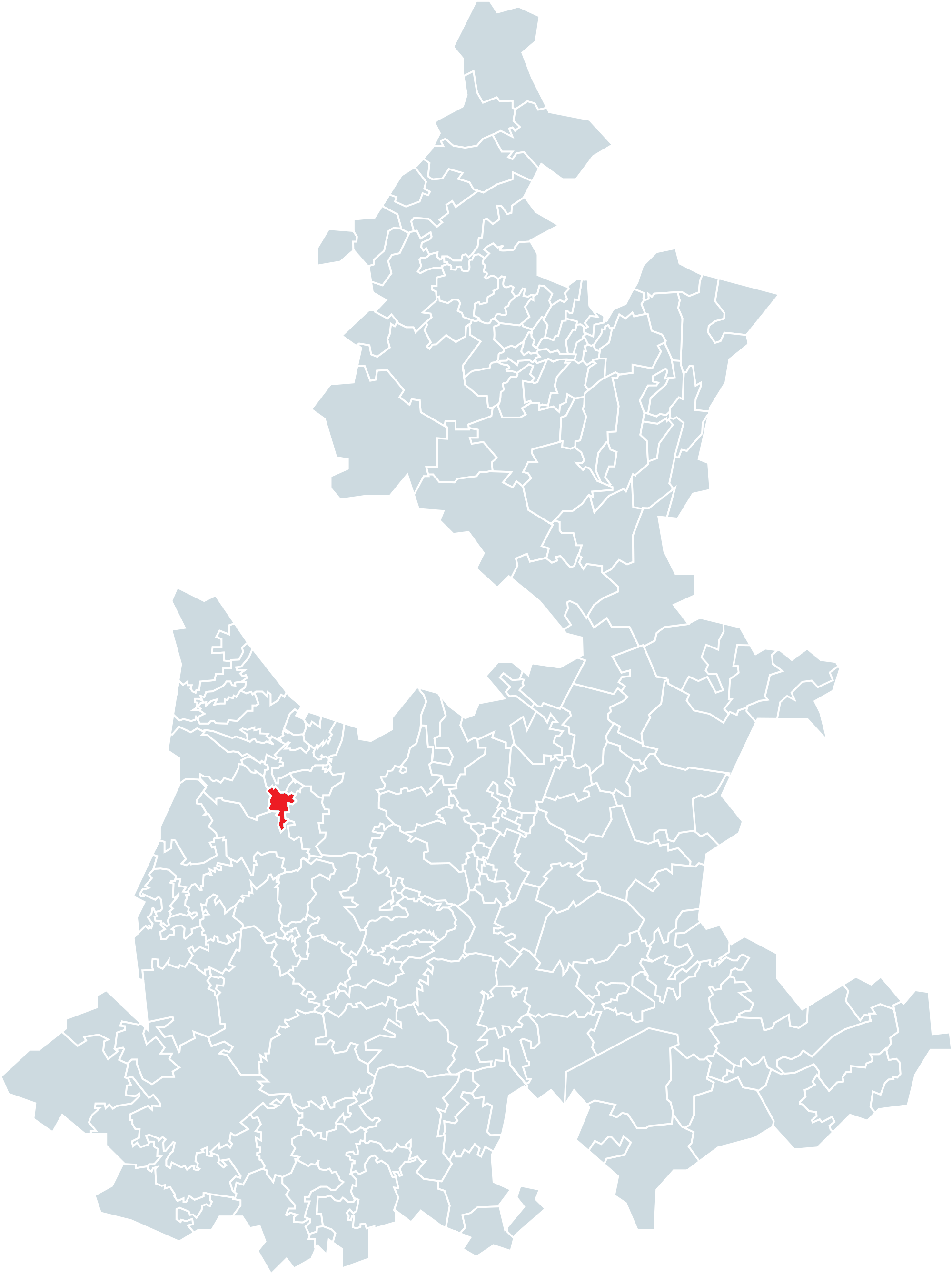 Municipio de Santa Isabel Cholula